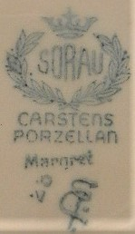 Cartens Porzellan Sorau Dekor Margret